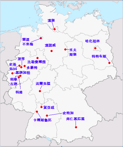 中文（中国大陆）: 圖片由User:JackyCheung (Now JAK)自行制造